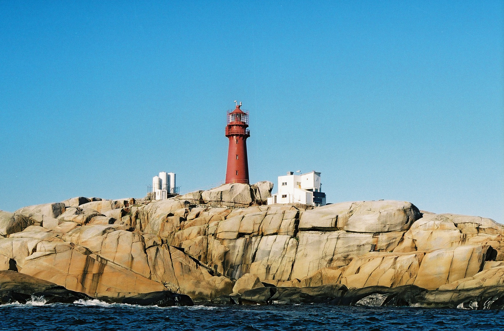 Svenner fyr, Larvik, Vestfold. Bygd 1900 i støpejern. Freda.